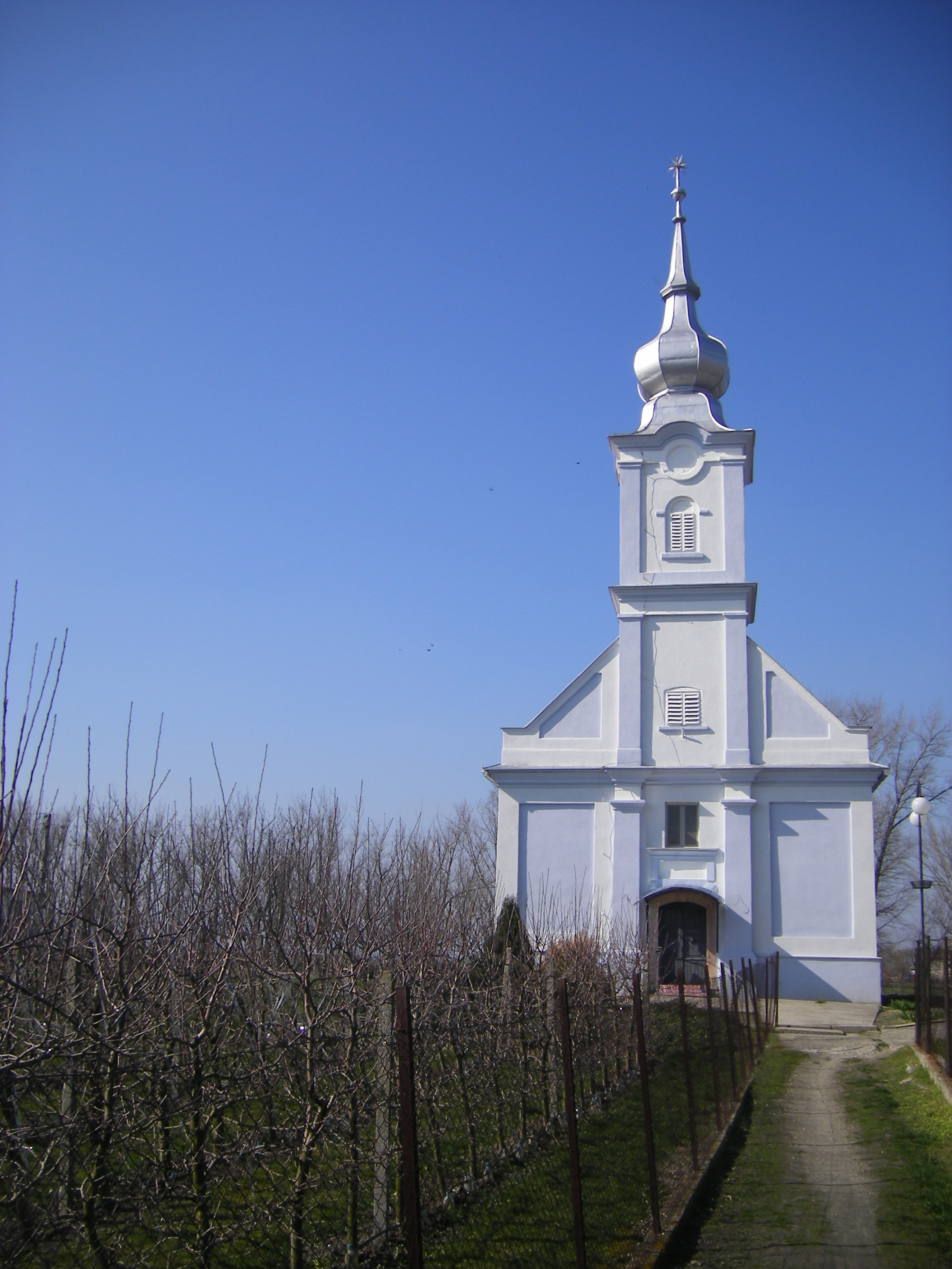 Tany, református templom.